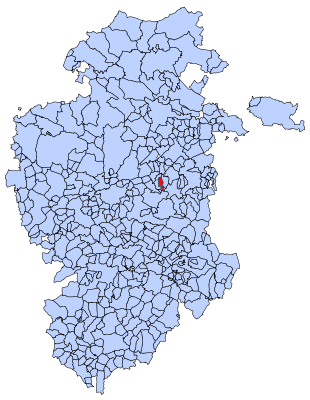 Arraya de Oca en Burgos